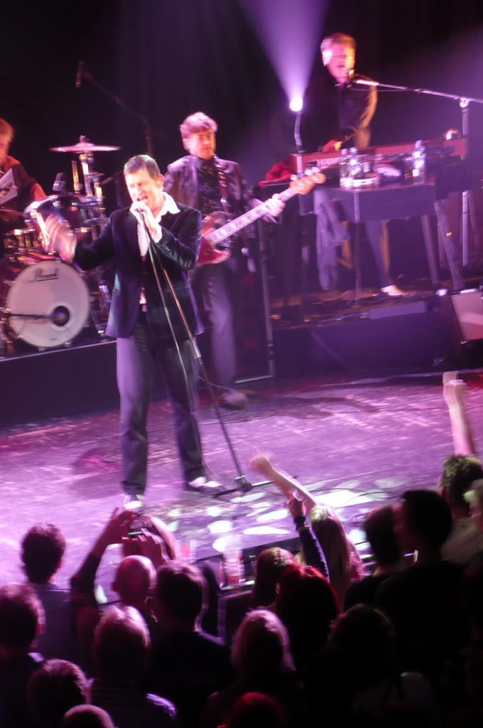 Huub van der Lubbe (zang), Antonie Broek (drums), Nico Arzbach (gitaar), Hans van der Lubbe (bas) en Pim Kops (toetsen) en JB Meyers (gitaar). Hot Haarlemmerdijk Horns Roland Brunt (tenorsax) en Peter van Soest (trompet).